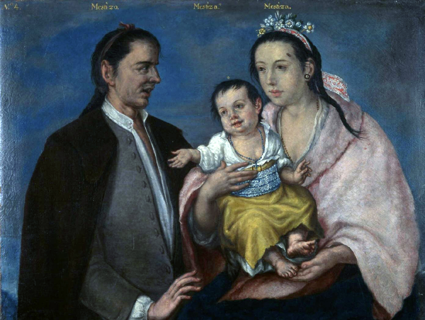 De la serie Los cuadros del mestizaje del Virrey Amat